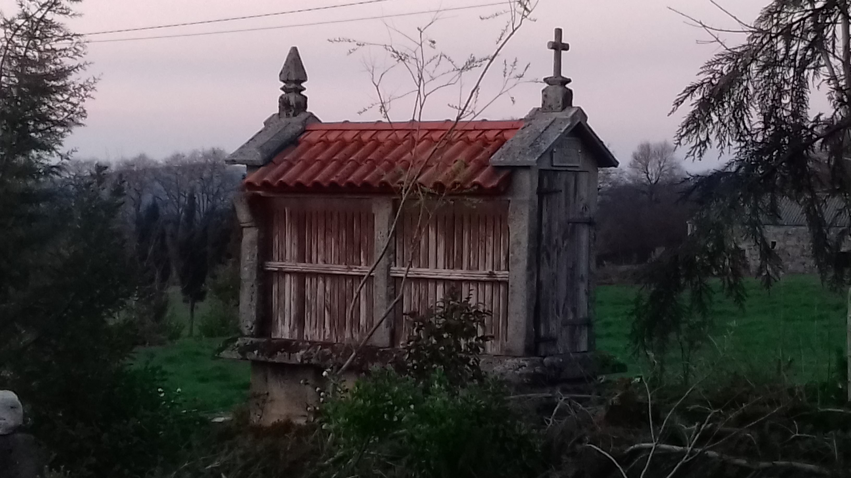 Horreo de Mizoite de Abaixo